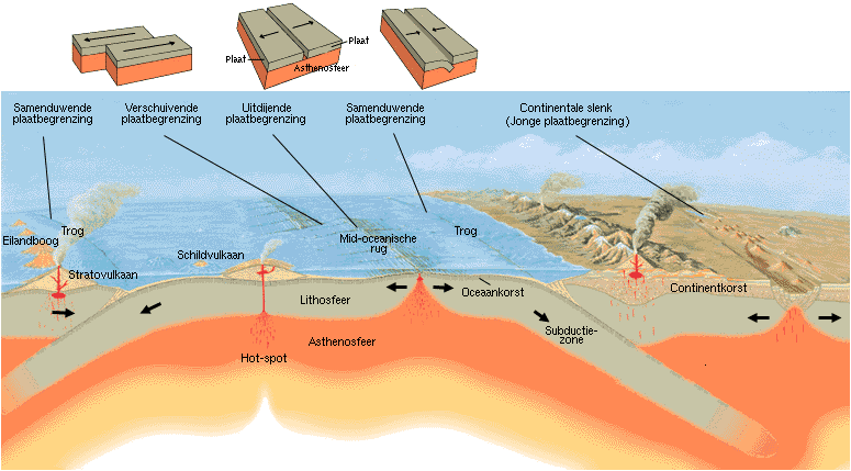 Afkomstig van Afbeeldingen van de USGS zijn publiek domein.